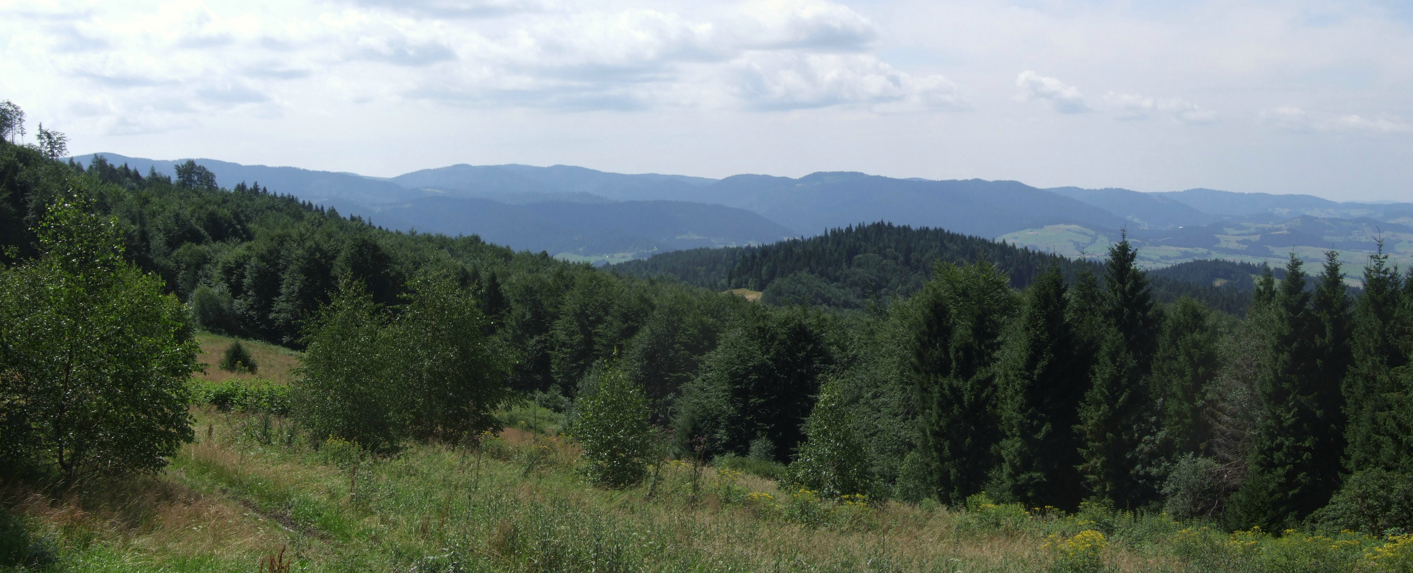 Polana Folwarczna. Poniżej Cyrkowa Góra, w głębi Gorce